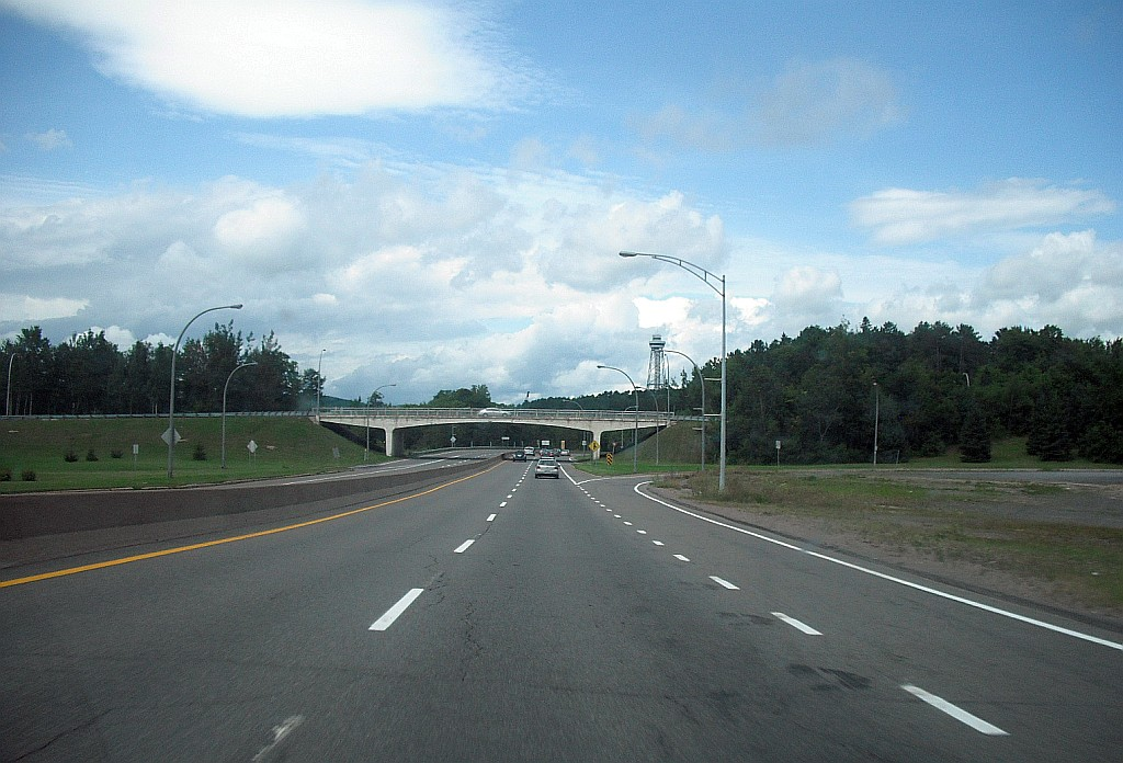 Vue sur la route 157, dans le secteur Shawinigan-Sud de la ville de Shawinigan, Québec, Canada. C'est le seul tronçon possédant des bretelles d'entrée et de sortie, quoique non-numérotées.